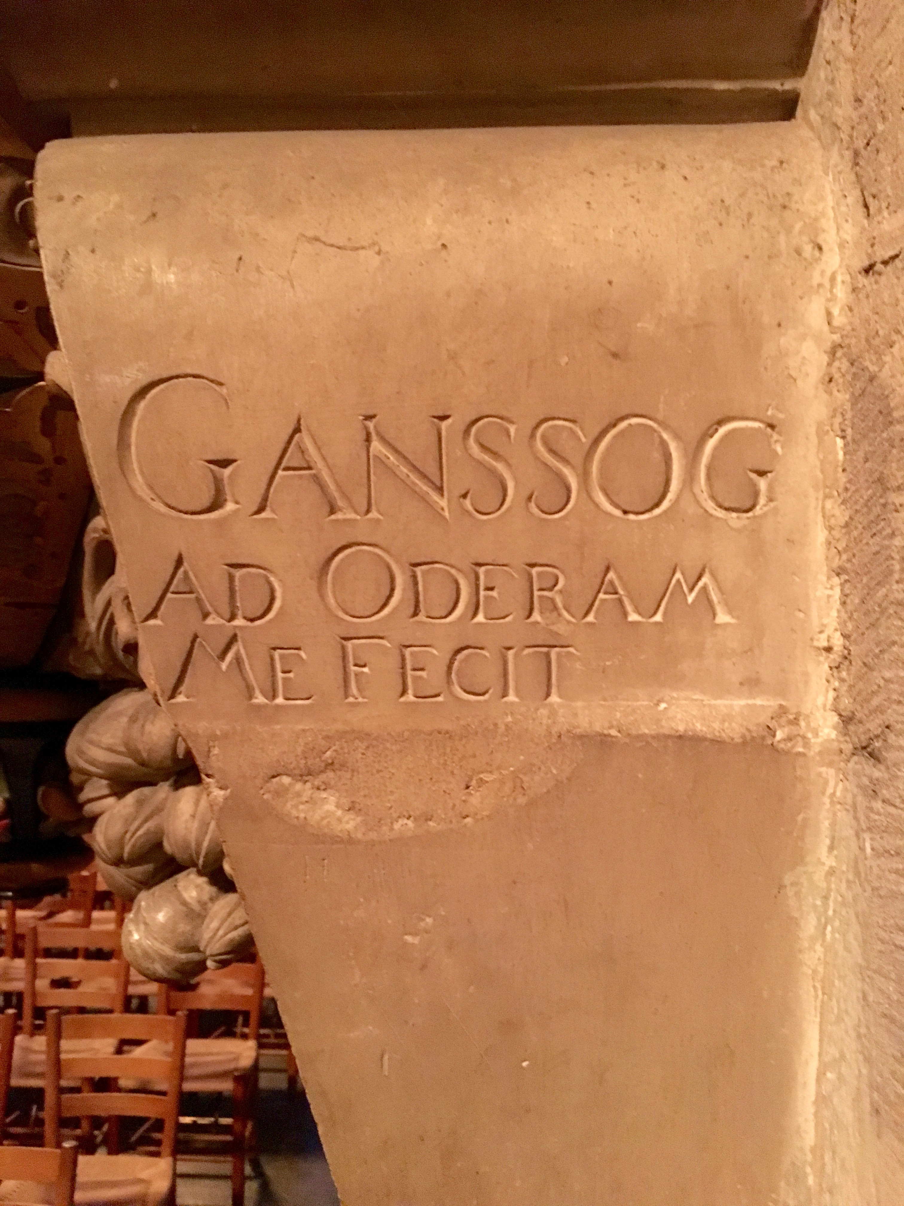 GANSSOG AD ODERAM ME FECIT, fra prædikestolen i Lund Domkirke, Skåne, Sverige